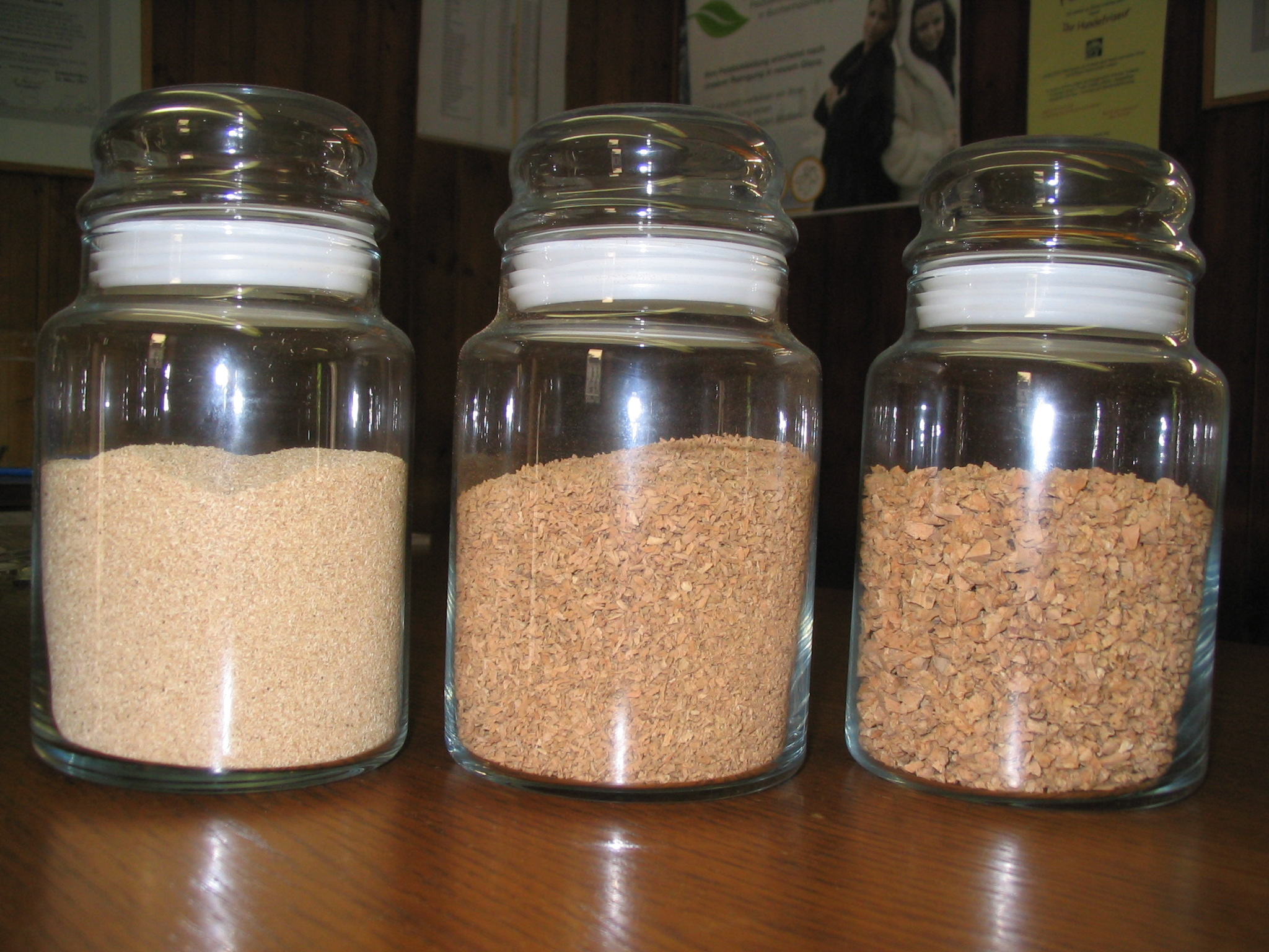 Pelz-Reinigungsmehle (Läuterspäne). Links Buchenmehl, Mitte und rechts Korkgranulate. gesehen in der Firma Lederreinigung Dieter, Höninger Weg 107, 50969 Köln-Zollstock Inhaber: Theodoro Saracino. Lederreinigung, Leder-Möbelreinigung, Lederfärberei, Pelzreinigung